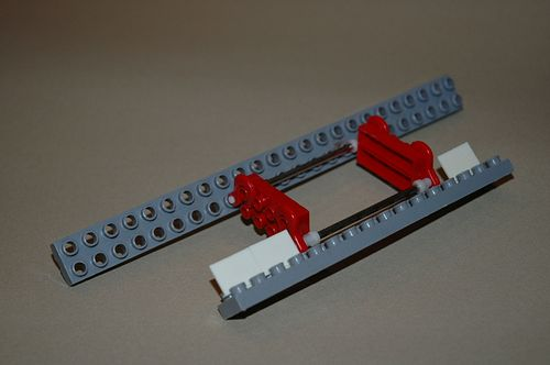 Verbindungsmöglichkeit unterschiedlichster Bausteine von Rasti.